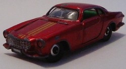 Lone Star model van een Volvo 1800ES